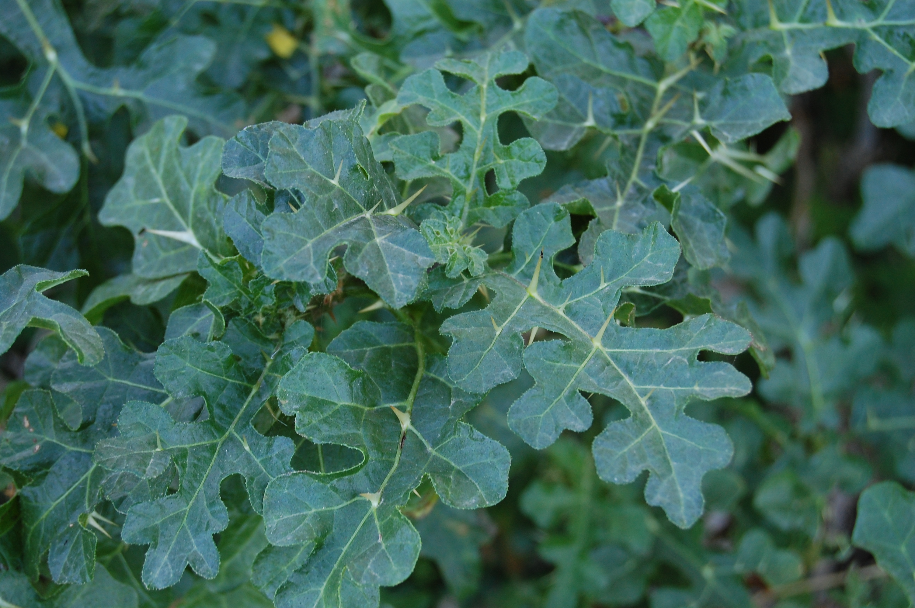 Solanun sodomaeum (= Solanum linnaeanum) Riserva naturale Capo Gallo, Palermo, Sicily